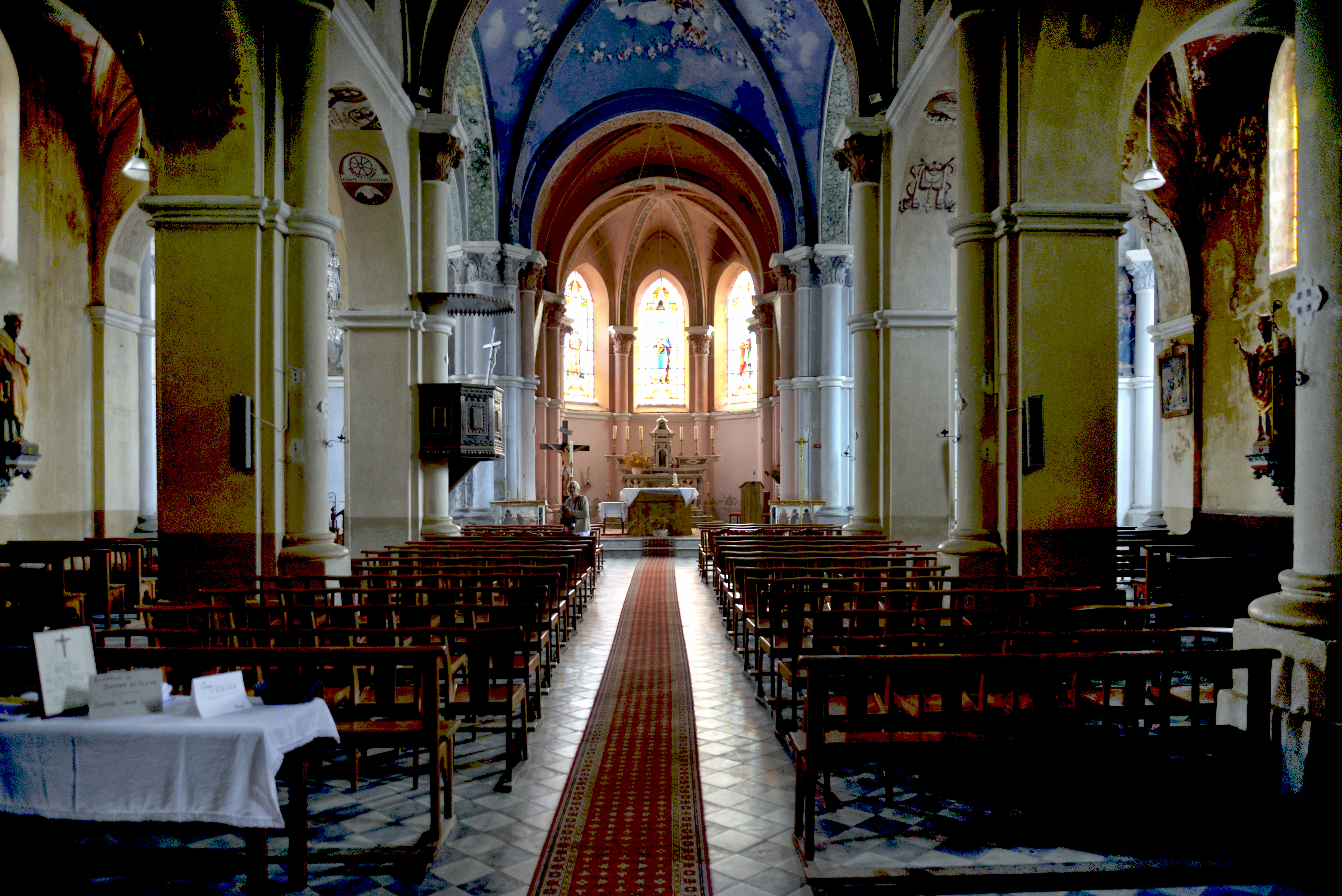 Bastelica, Taravu-Bastelica (Corse) - Intérieur de l'église paroissiale Saint-Michel